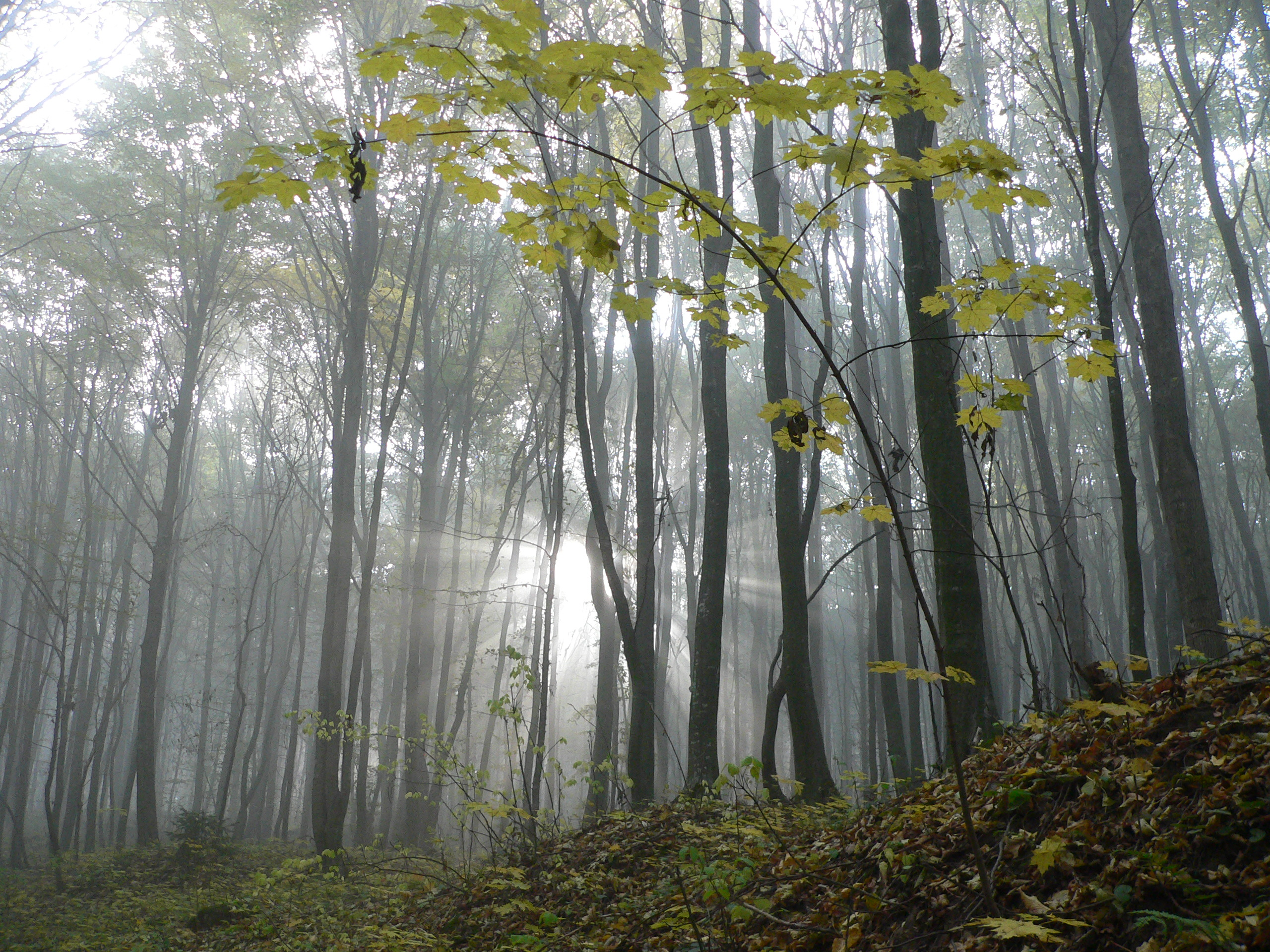 Туманний ранок в Медоборах